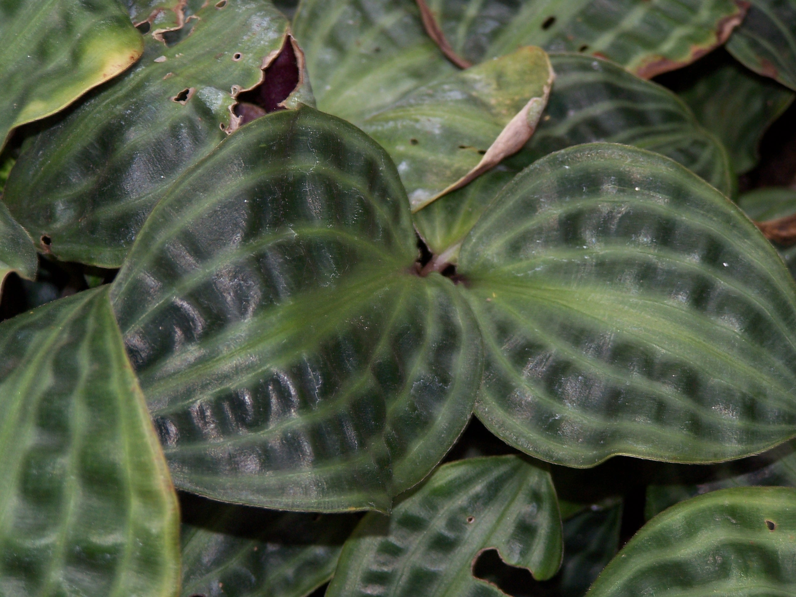 Geogenanthus poeppigii 17 juin 2006 Vieux jardin botanique de Göttingen